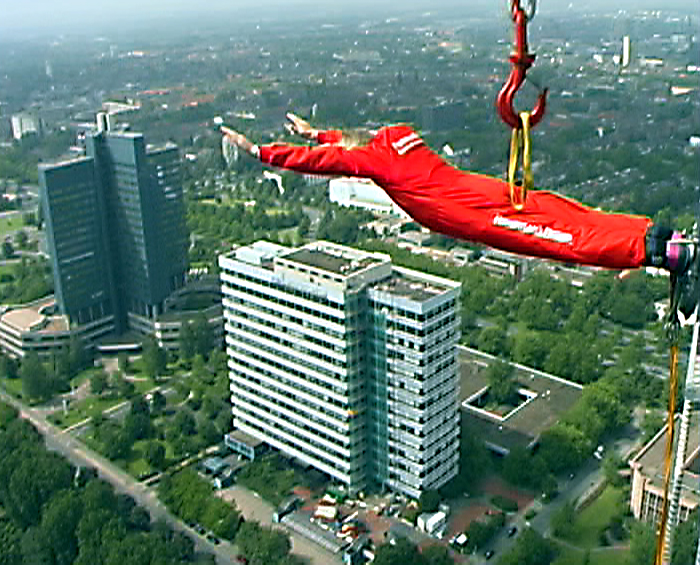 bungee jumping vom Dortmunder Fernsehturm; Plattform wegen eines Todesfalles inzwischen geschlossen